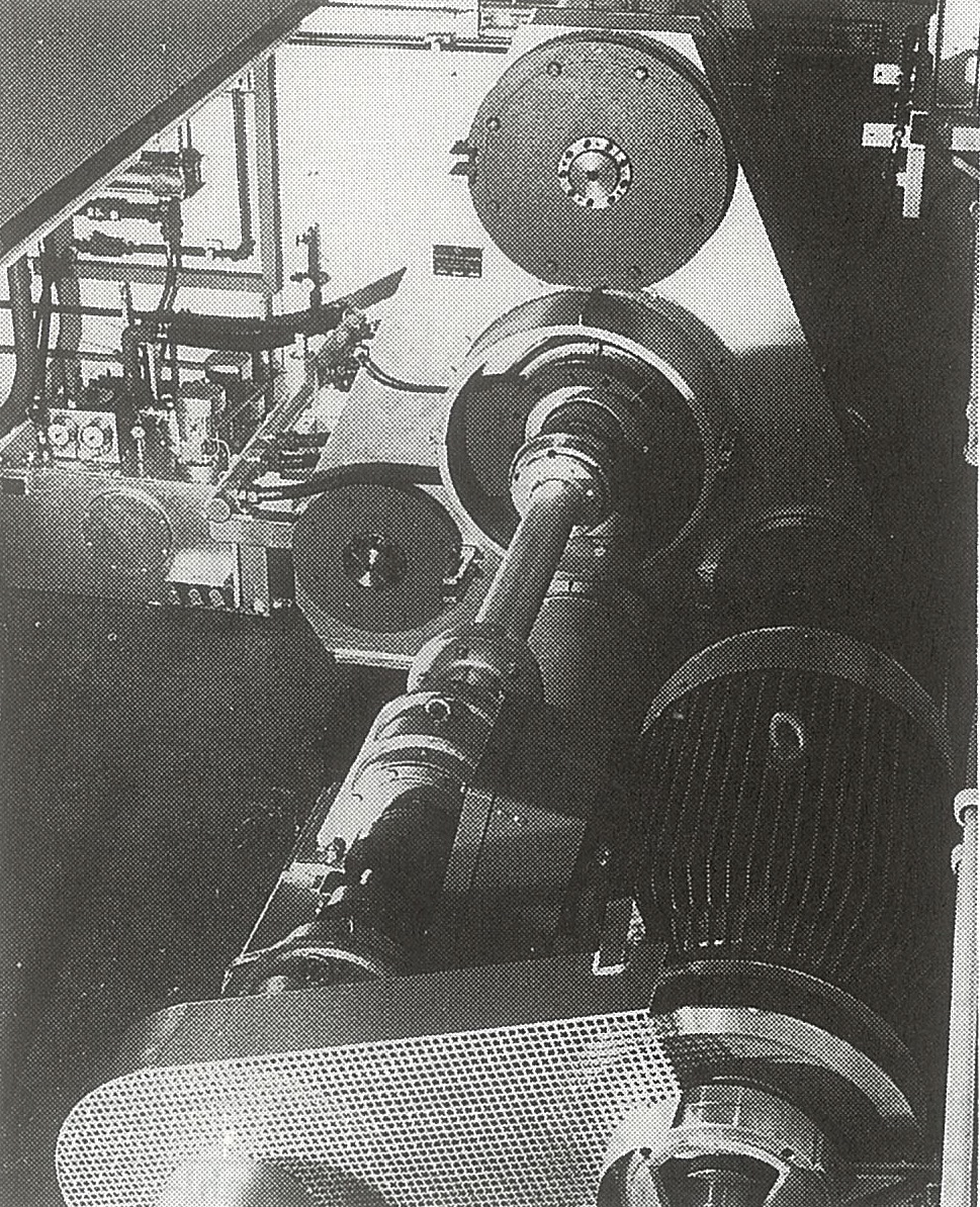 Schwingmühlen-Versuchsstand (Dreirohrschwingmühle) Drehkammer-Schwingmühle Mahlrohrdurchmesser 1 x D = 500 mm (oben) und 2 x D = 350 mm (unten)mit Stäben ø 25 mm